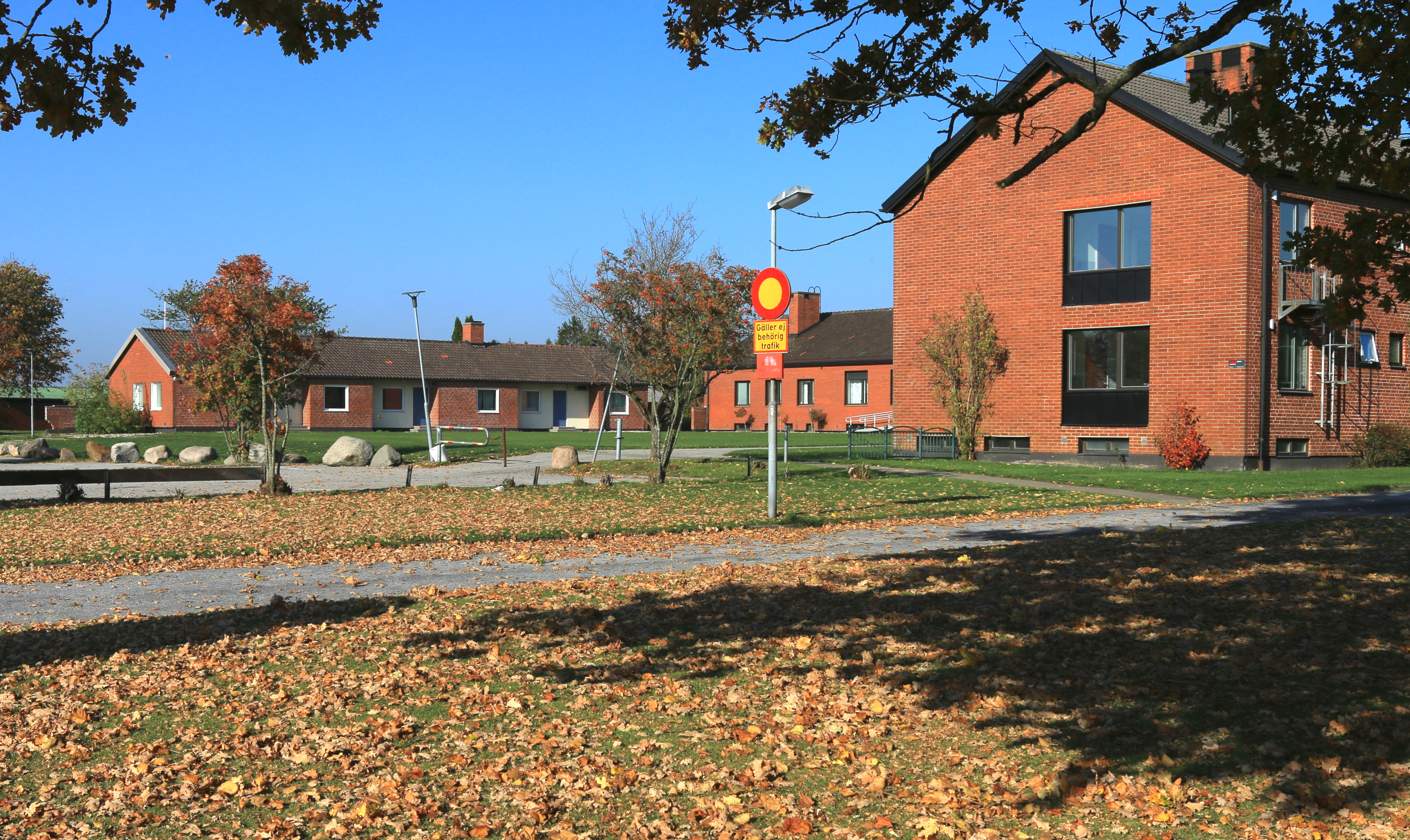 Nils Holgersson-gymnasiet, Skurup